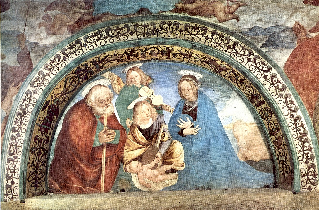 Gaudenzio Ferrari, Nativity, fresco, ca. 1515 Church of Madonna di Loreto, Roccapietra, Varallo (VC), Italy